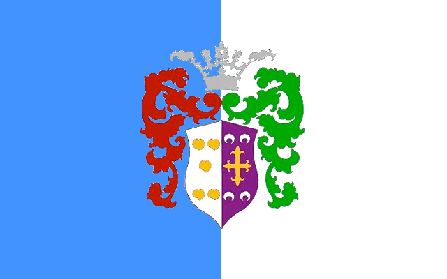 Bandera de Candelario